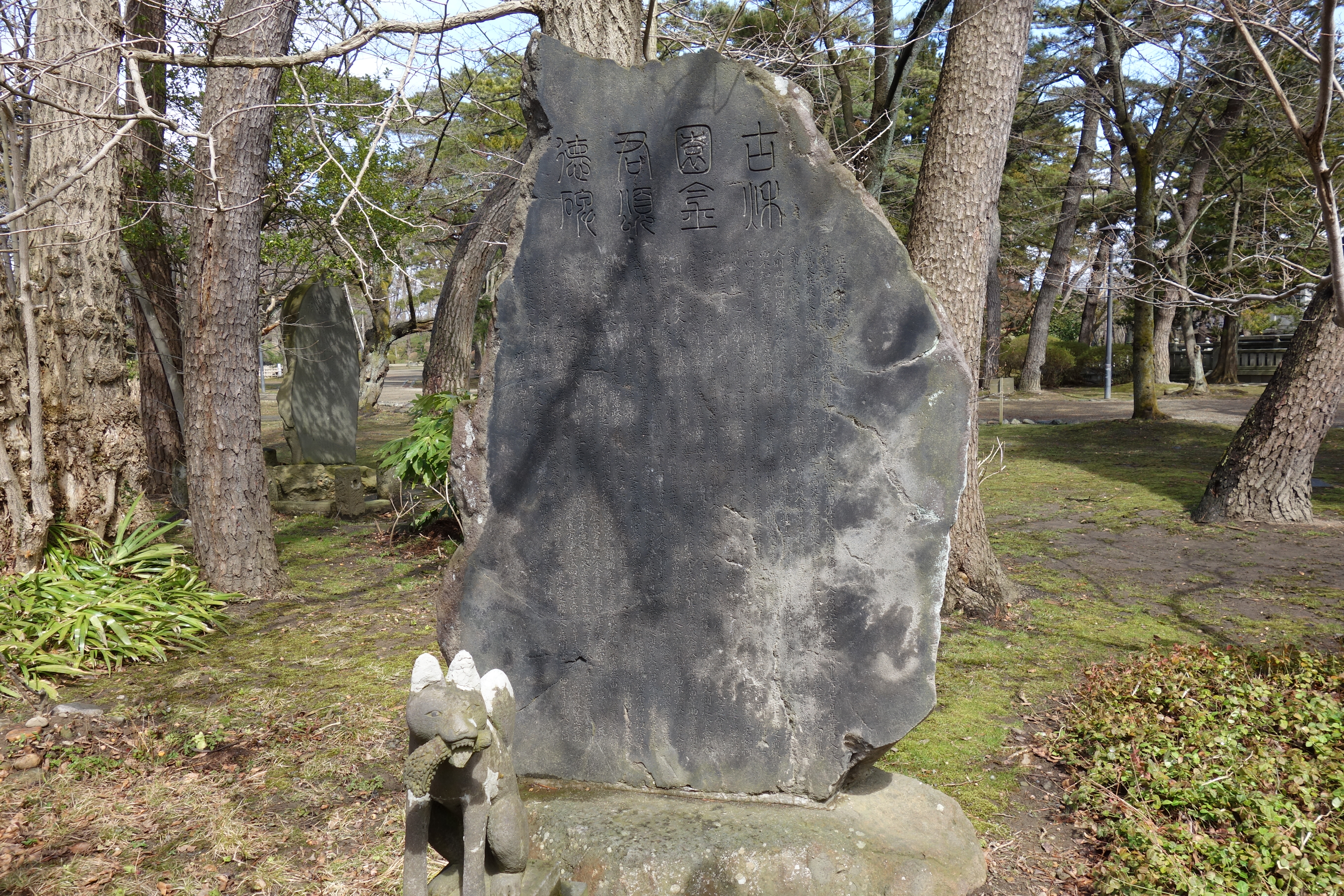 古秋園金君頌徳碑 久保田藩の武士であった、金易右衛門の碑 秋田市千秋公園、与次郎稲荷神社の参道脇にある